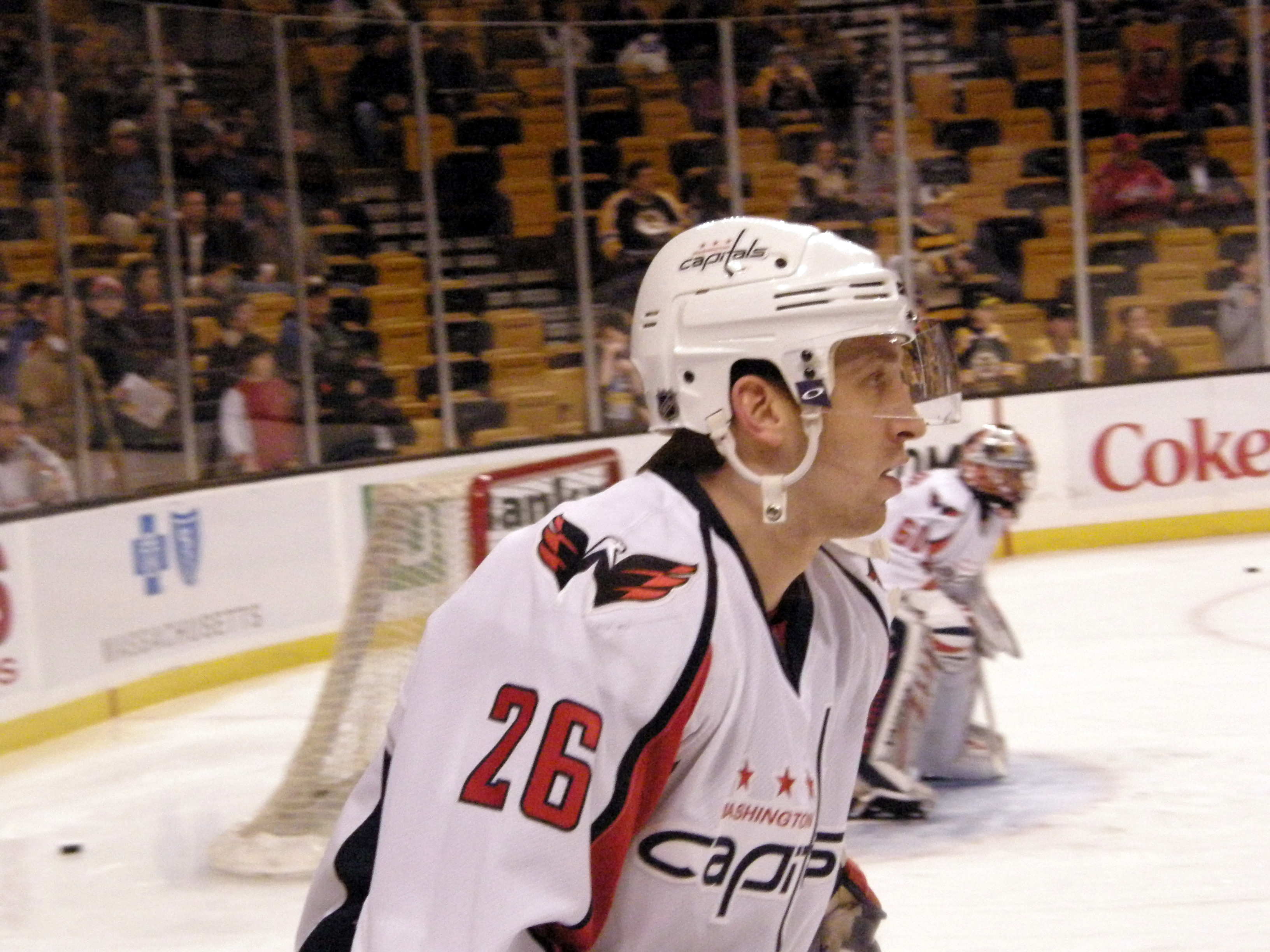 26 Shaone Morrisonn